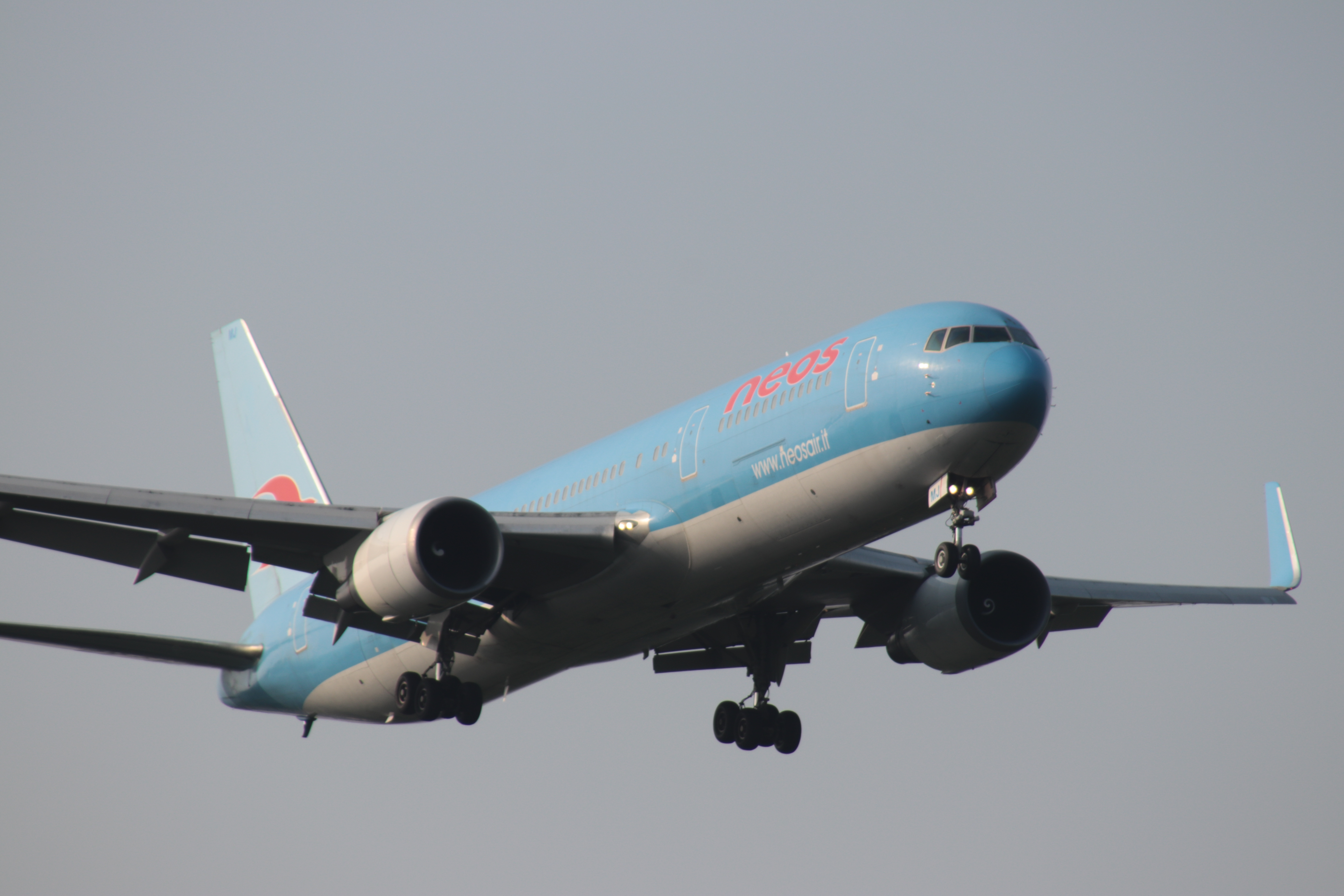 B763 di Neos Air, durante l'atterraggi all'Aeroporto internazionale di Milano Malpensa